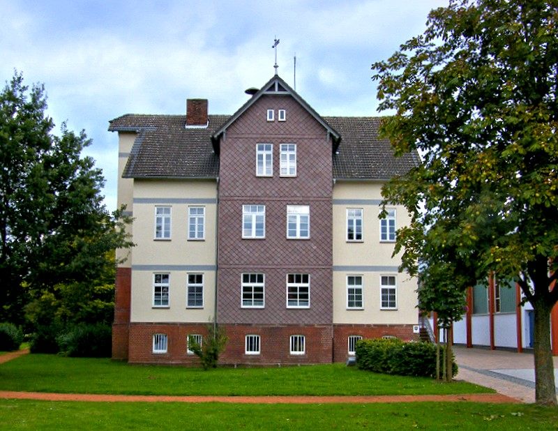 Gemeindevewaltung (Rathaus) - ehem. Gutshaus